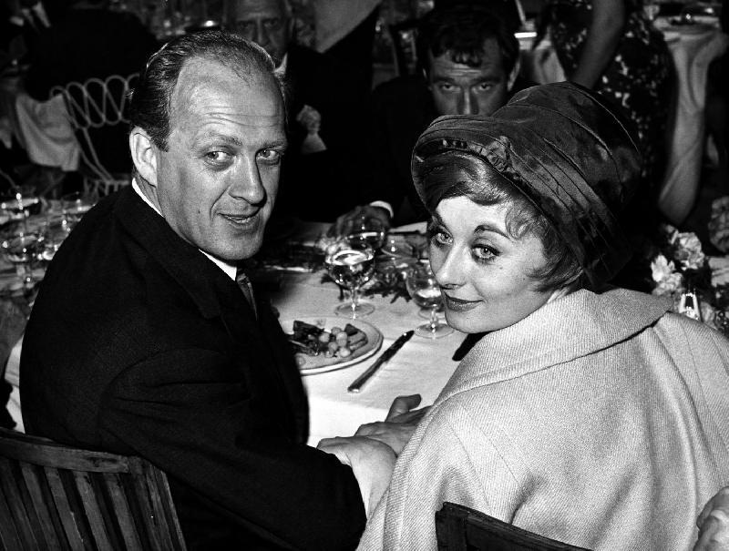 Raimondo Vianello e Sandra Mondaini il giorno del loro matrimonio